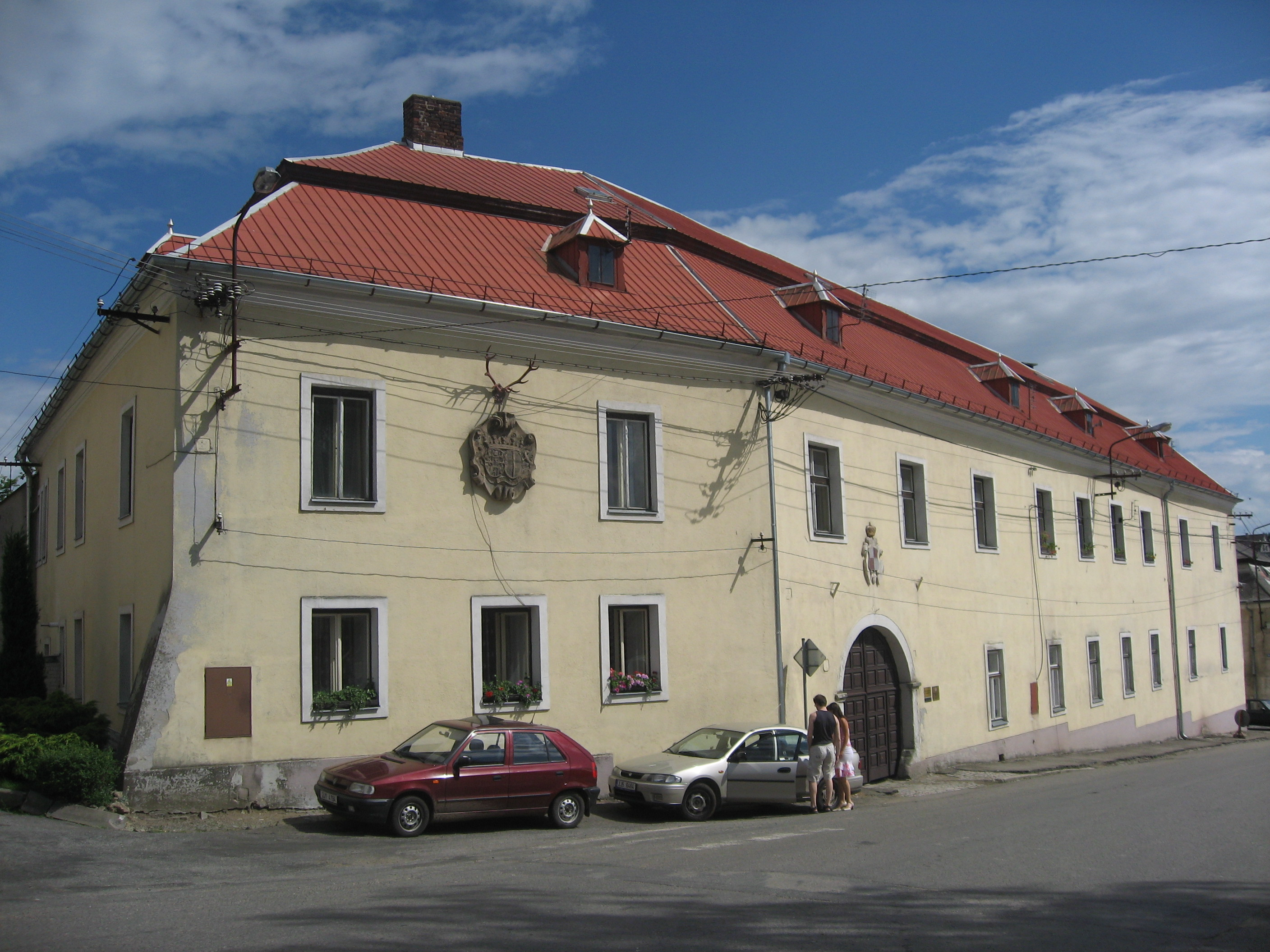 Štoky